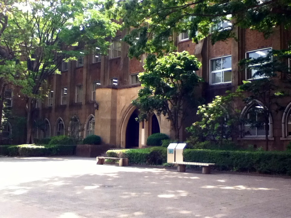 学習院大学西１号館